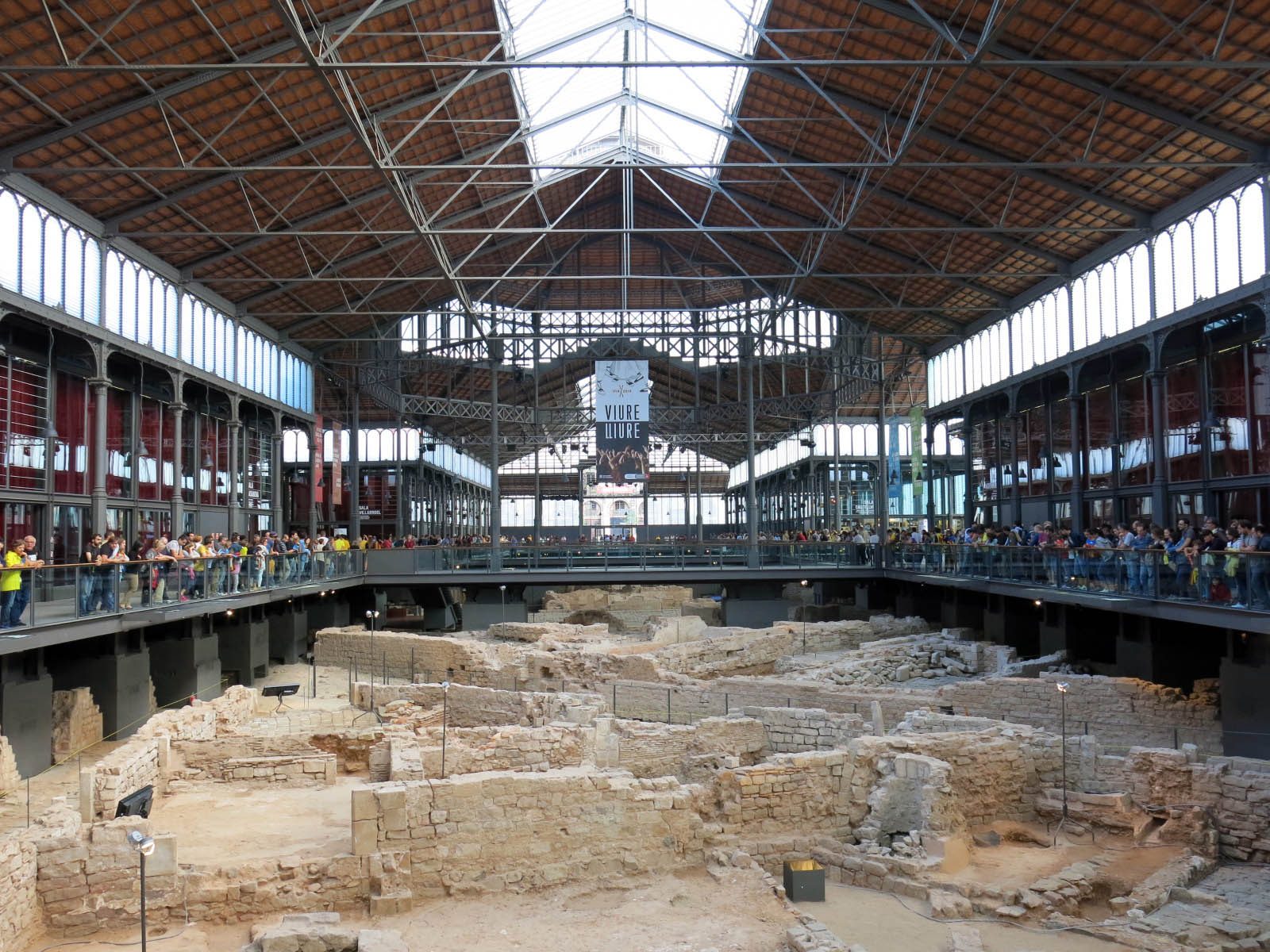 Mercat del Born (Barcelona) Object location41° 23′ 08.76″ N, 2° 11′ 01.54″ E